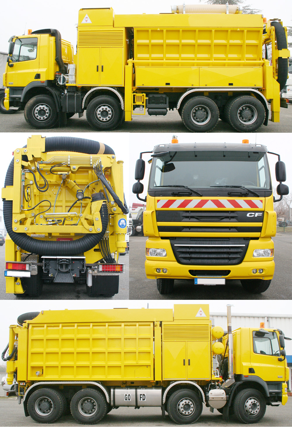 Présentation d'une excavatrice-aspiratrice